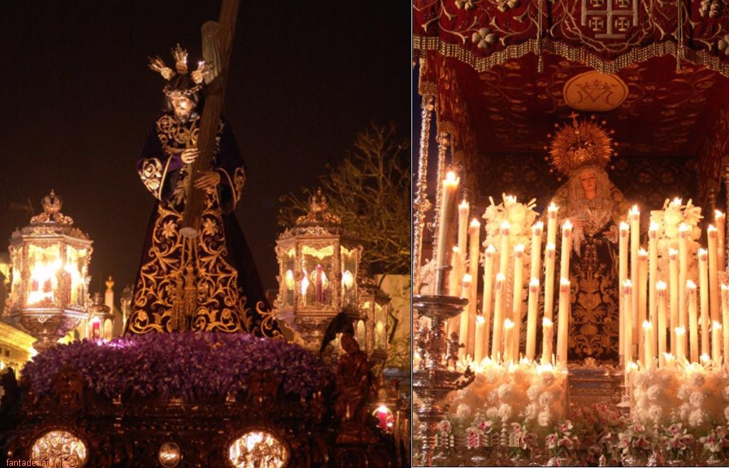 el nazareno de la isla y la virgen de los dolores